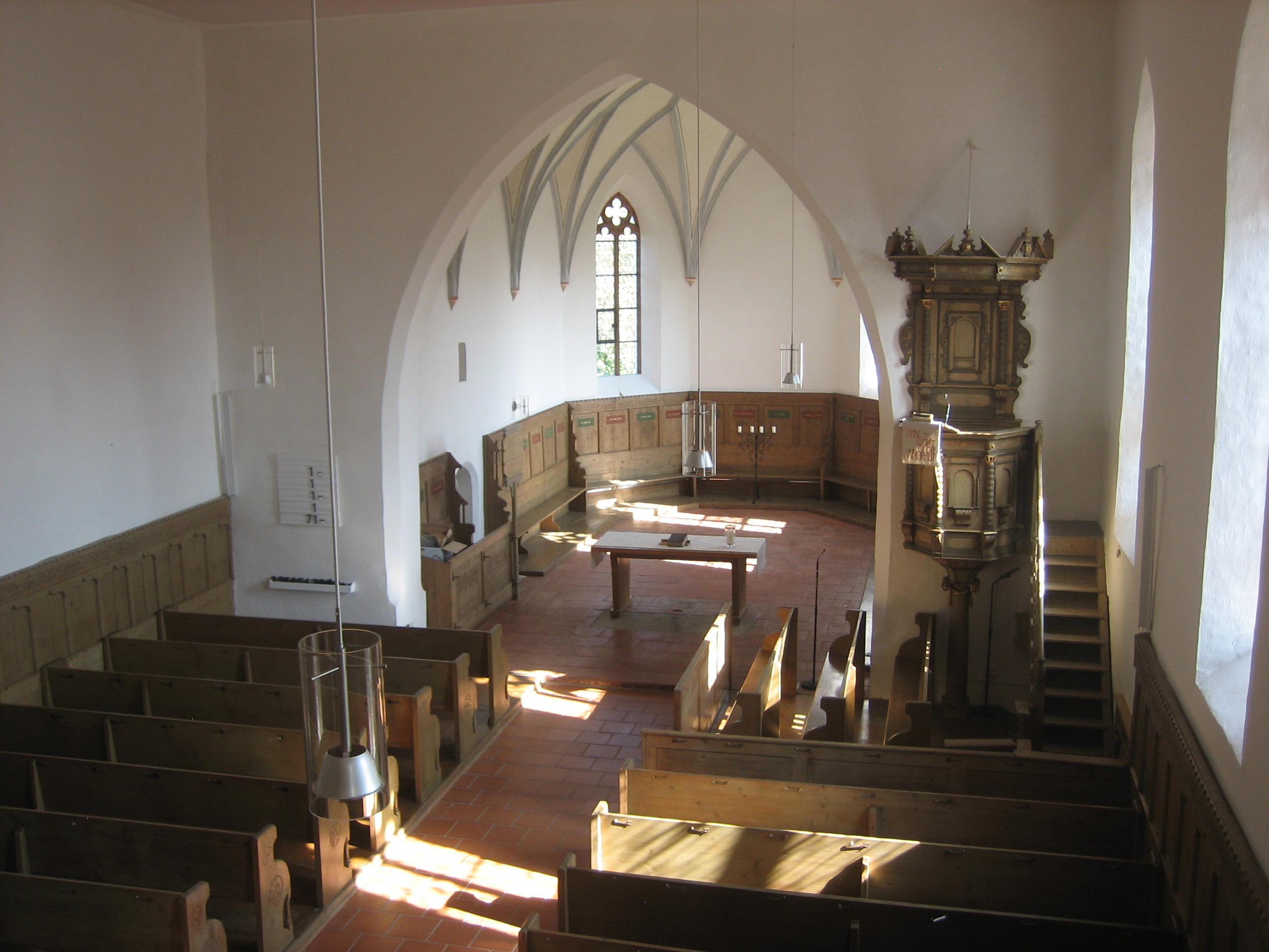 Ev. Ref. Pfarrkirche Theinselberg, Gemeinde Lachen, Landkreis Unterallgäu, Bayern